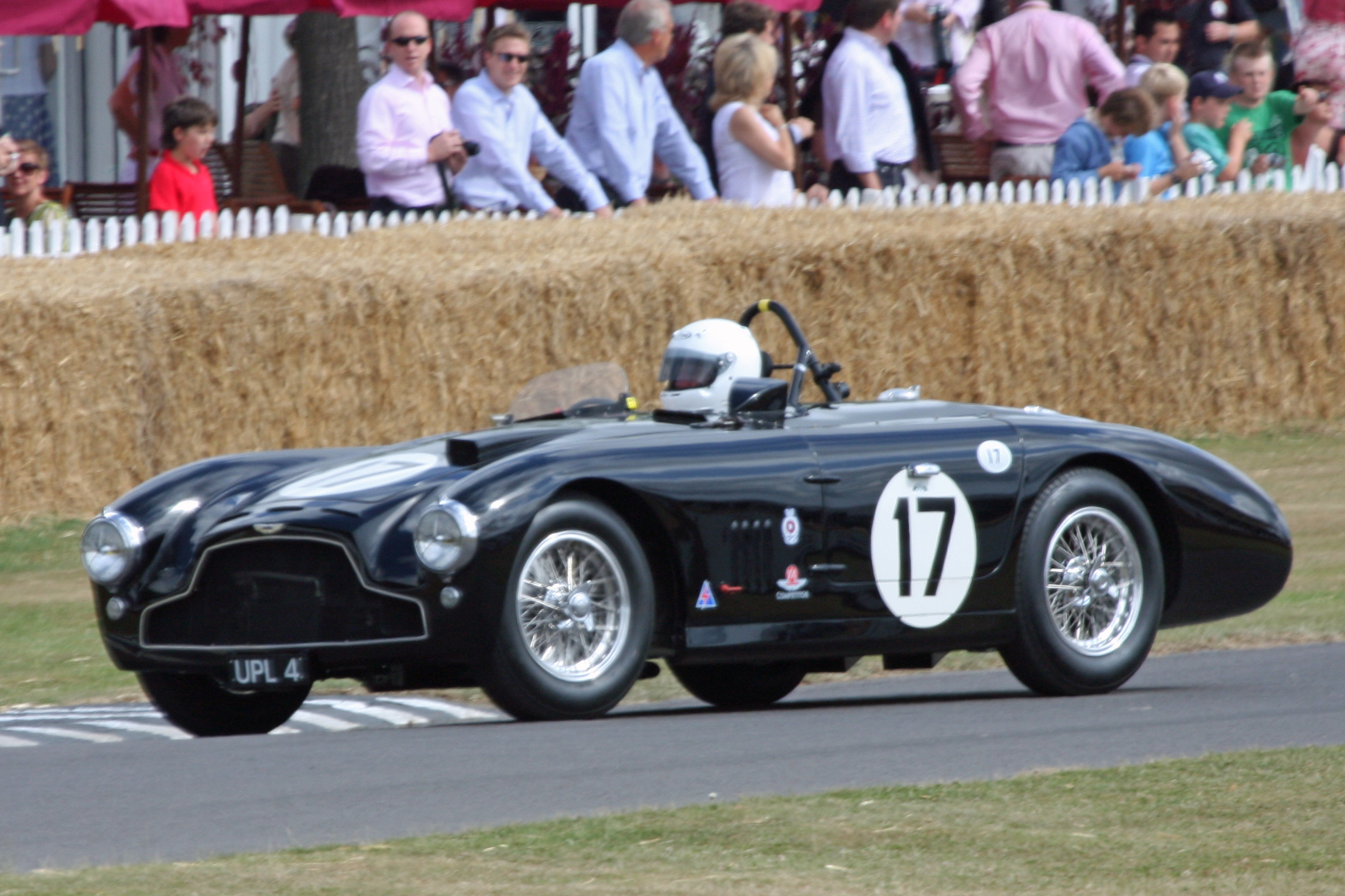 Goodwood 2009